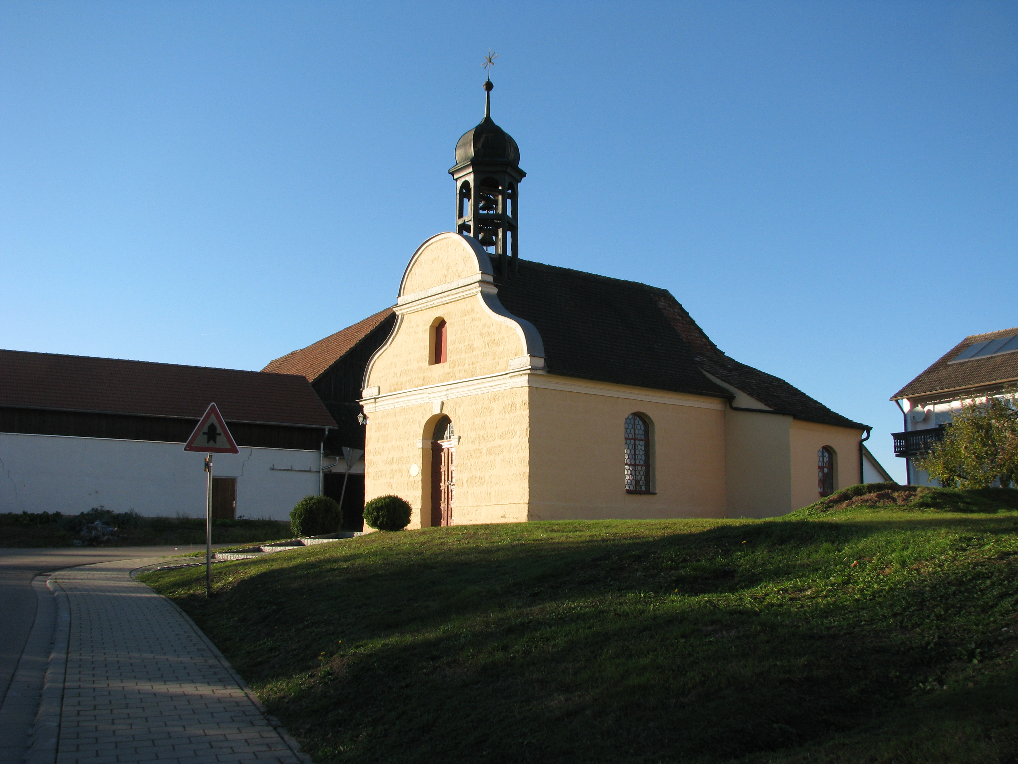 Pierheim, Ortsteil von Hilpoltstein im mittelfränkischen Landkreis Roth in Bayern, Marienkapelle von 180/21